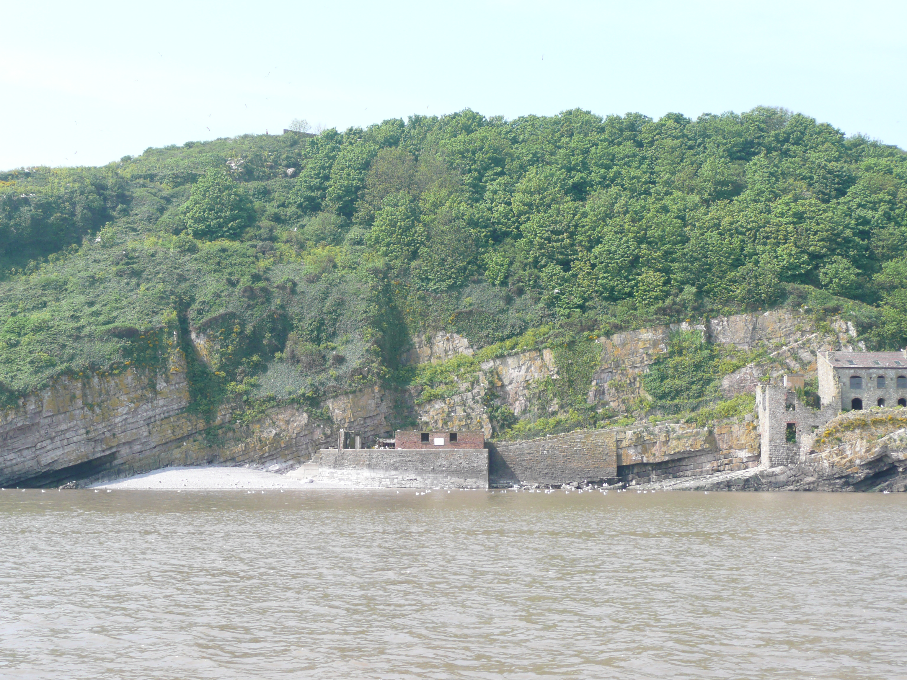 Steep Holm island